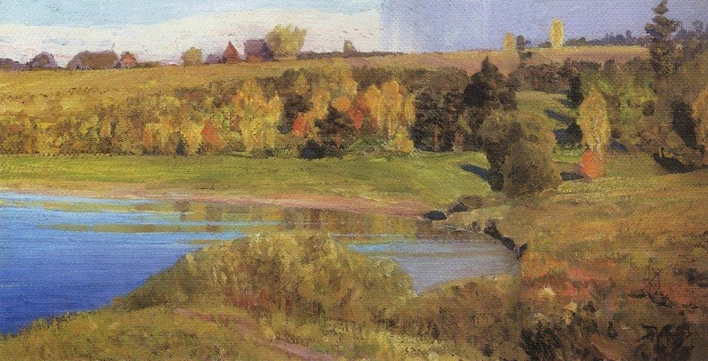 Поленов Василий Дмитриевич (1844-1927). Ока близ Тарусы. 1892